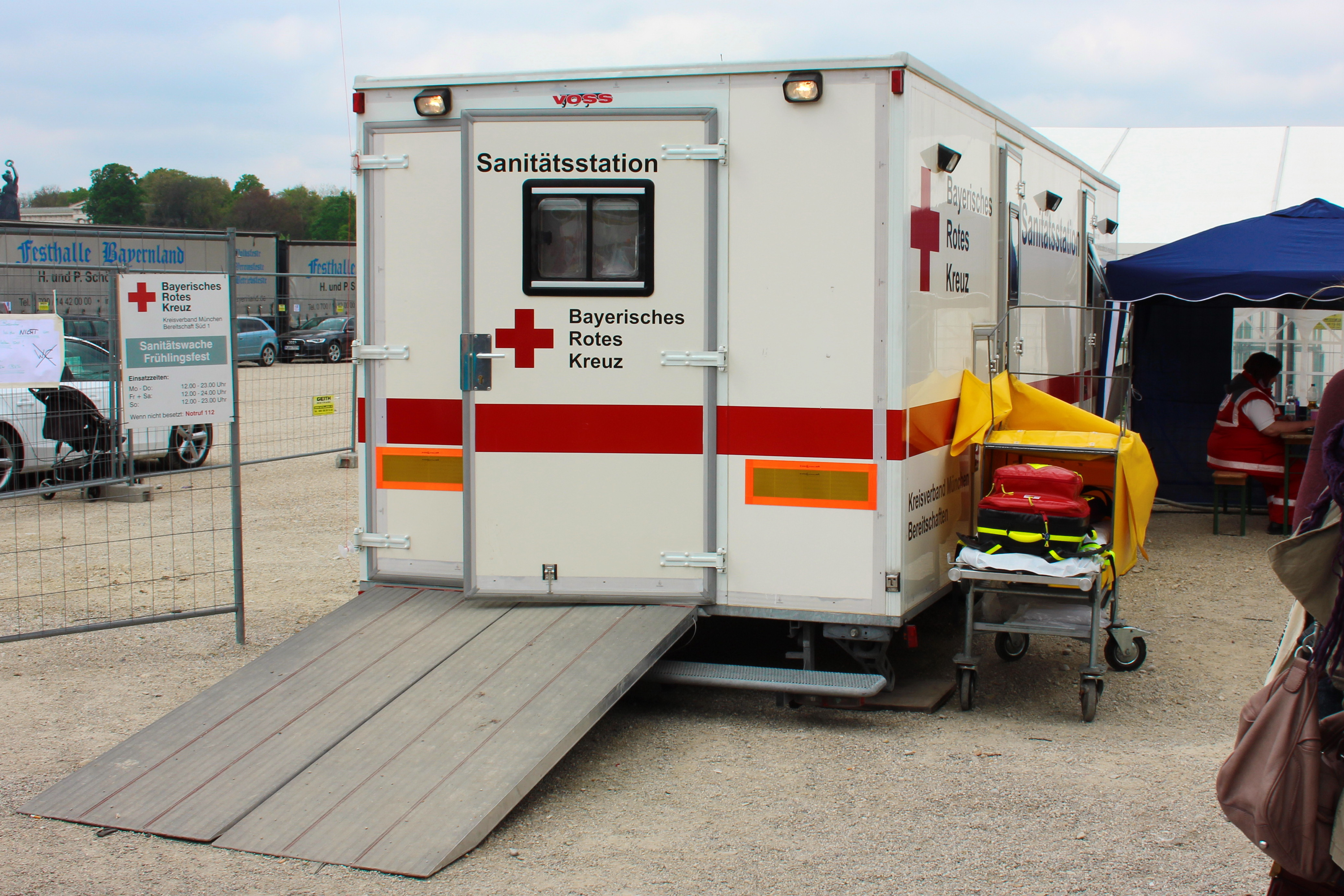 Erstehilfestation in einem Anhänger auf der Theresienwiese während des Frühlingsfestes.